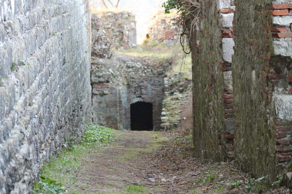 Rocca di Ripafratta (PI) - corridoio di ingresso a man destra, realizzato durante il restauro fiorentino del 1504